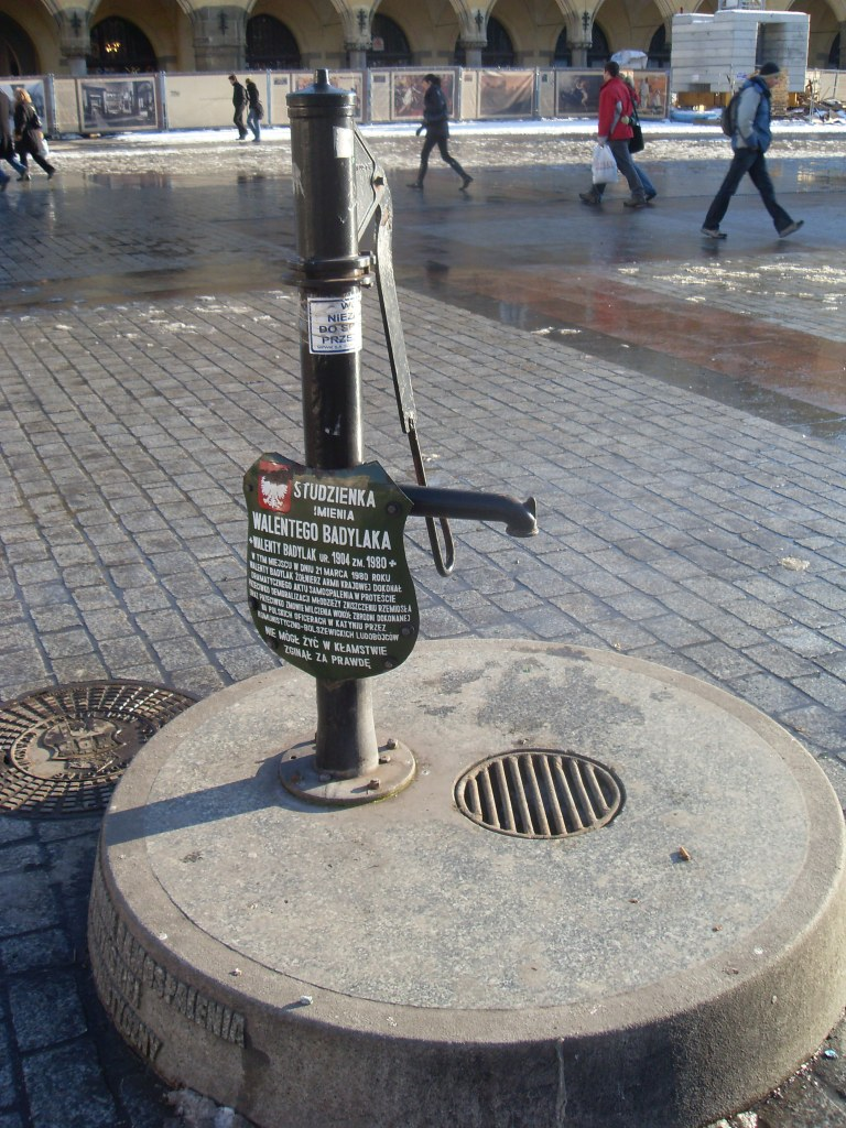 Studzienka im. Walentego Badylaka na Rynku w Krakowie